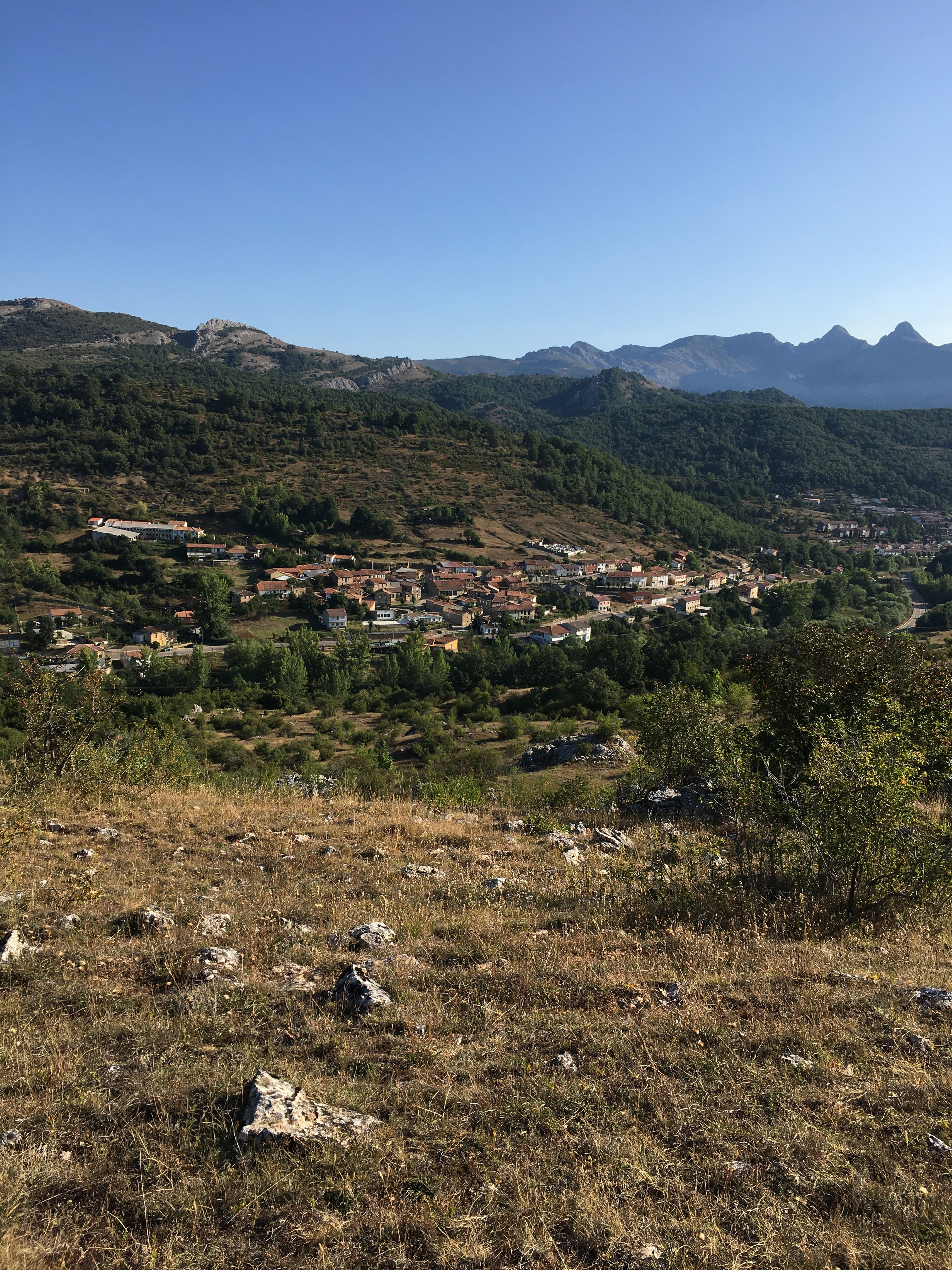 Vistas desde La Cruz.